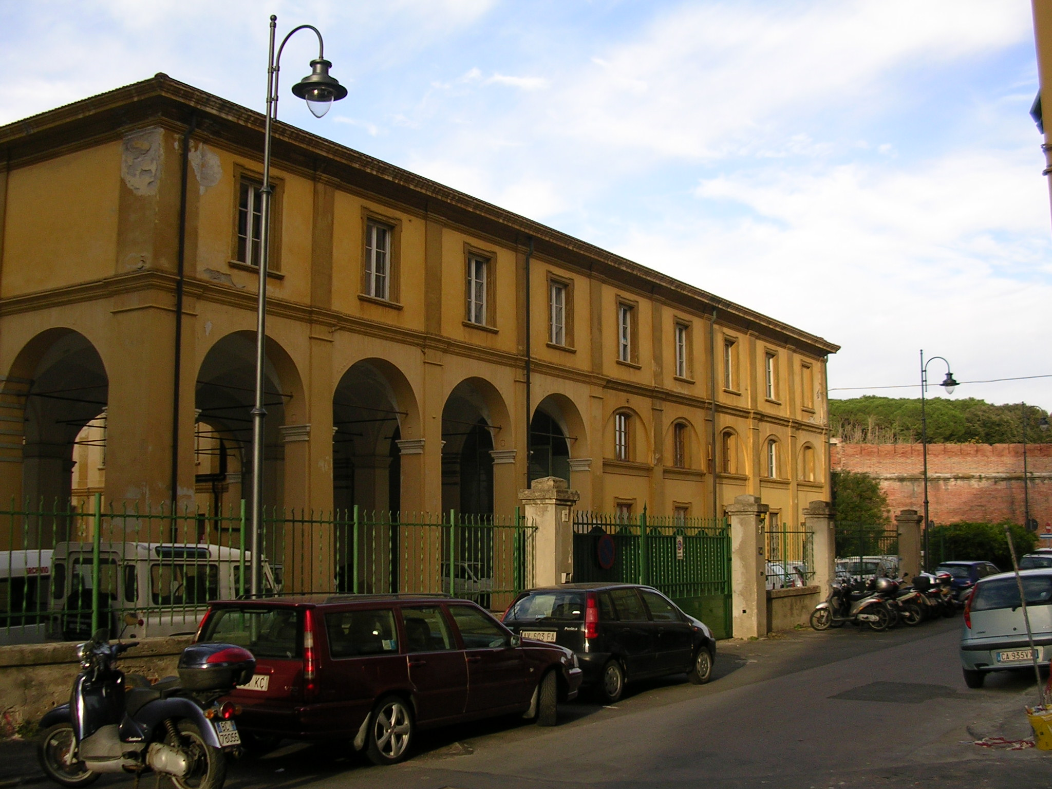 Livorno: la Pescheria Nuova, nel quartiere della Venezia Nuova.